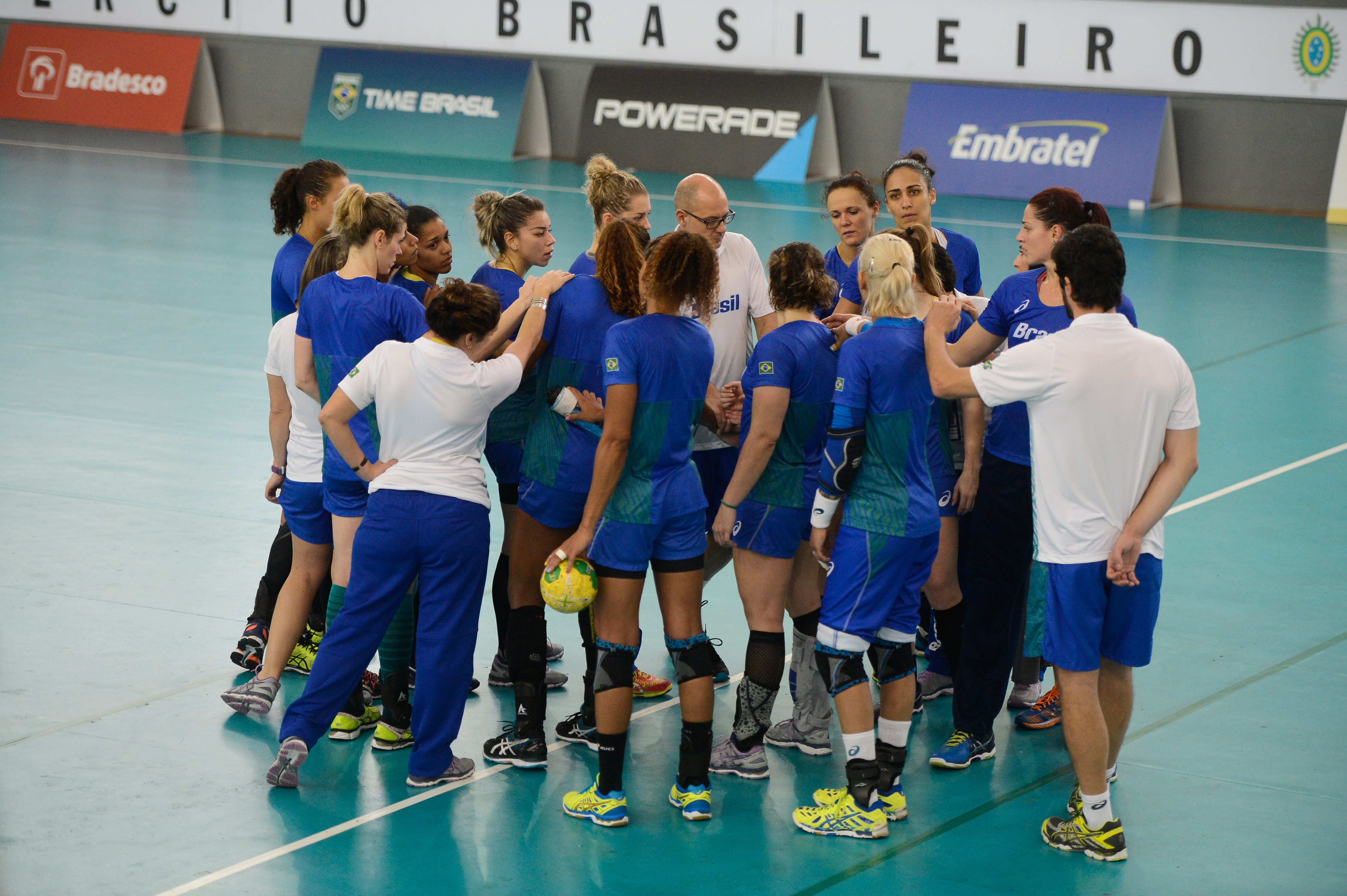 Rio de Janeiro - A Seleção Brasileira Feminina de Handebol faz treino aberto na Escola de Educação Física do Exército, na Urca, zona sul da capital (Tomaz Silva/Agência Brasil)